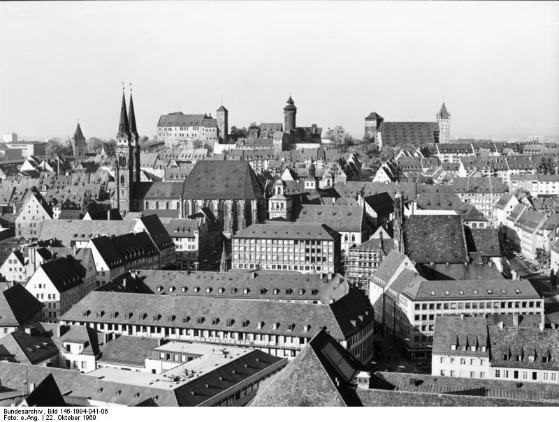 Nürnberg, Altstadt mit Kaiserburg Aufnahme 22.10.1969